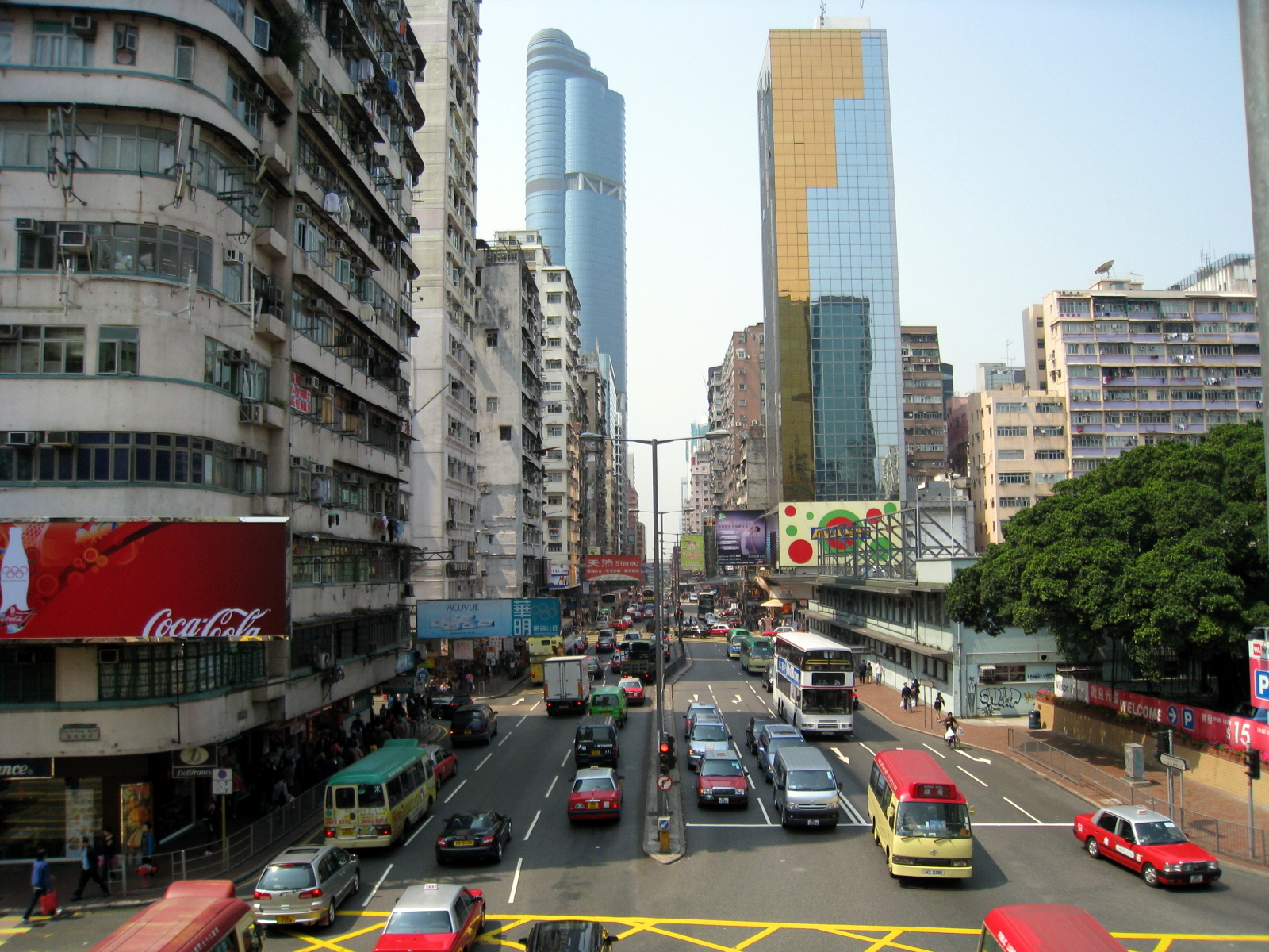 Hong Kong Kowloon Mong Kok District